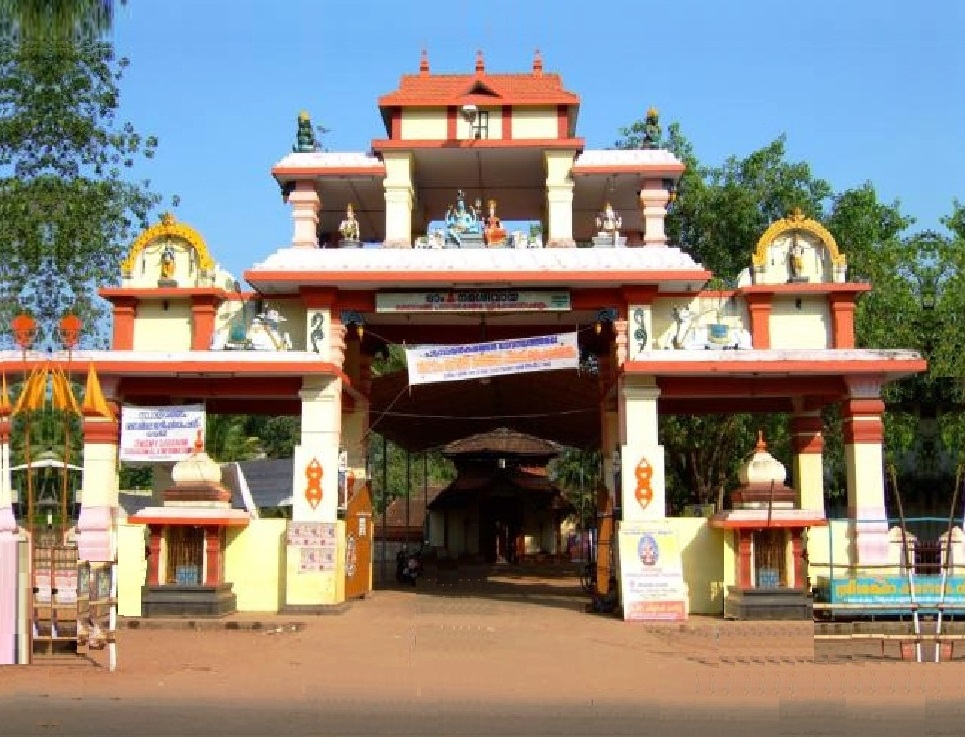 പടനായർകുളങ്ങര മഹാദേവക്ഷേത്രം